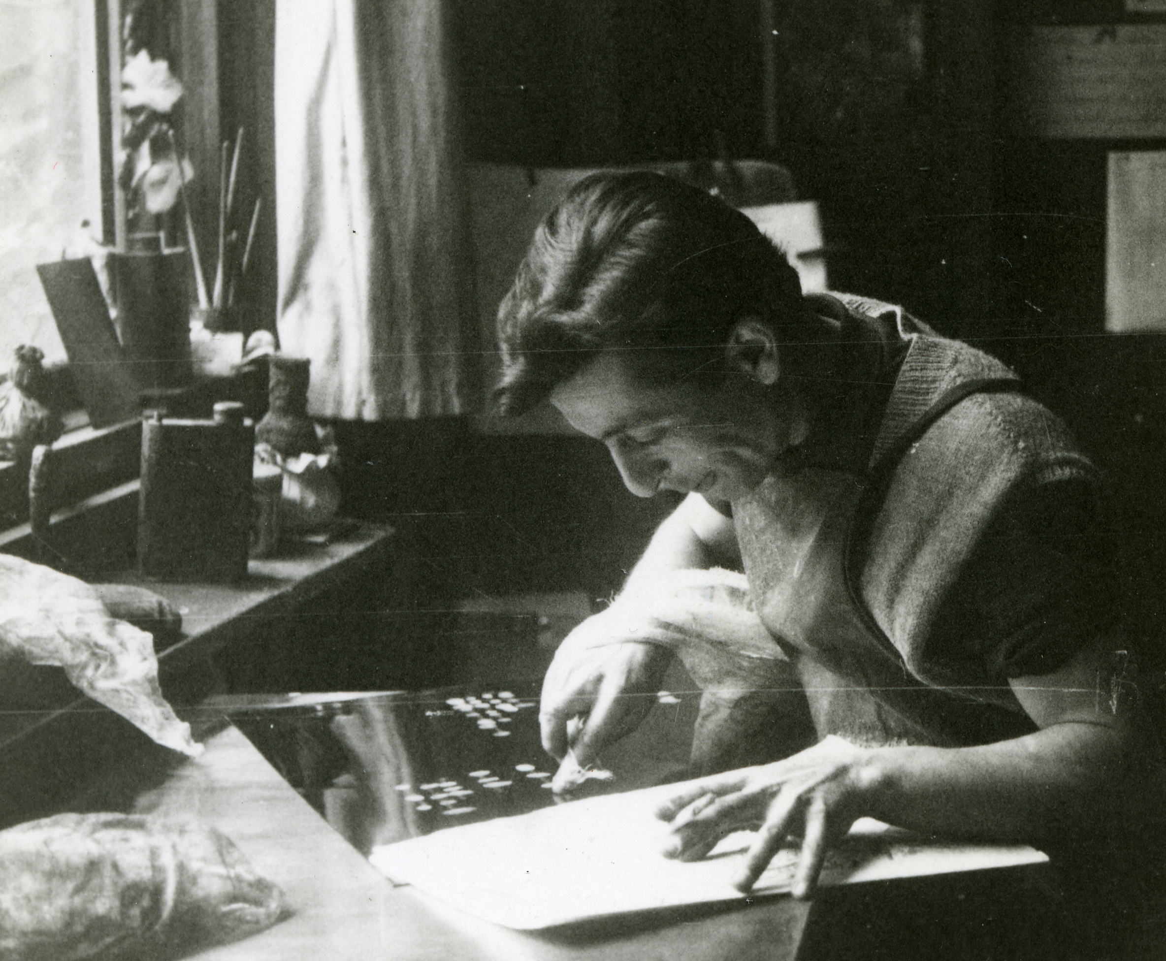 Le graveur français Marcel Fiorini imprimant le livre de bibliophilie "L'Herbier des dunes" de Jean Lescure à l'atelier Leblanc à Paris.